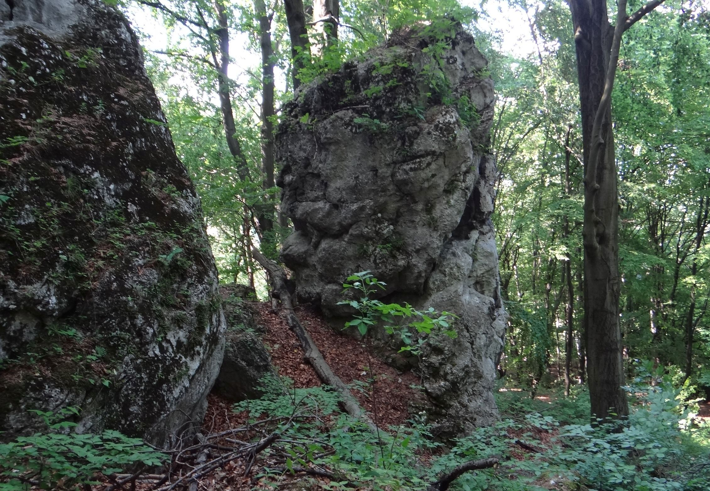 Kubińcowa Igła w Pierunkowym Dole w Nielepicach